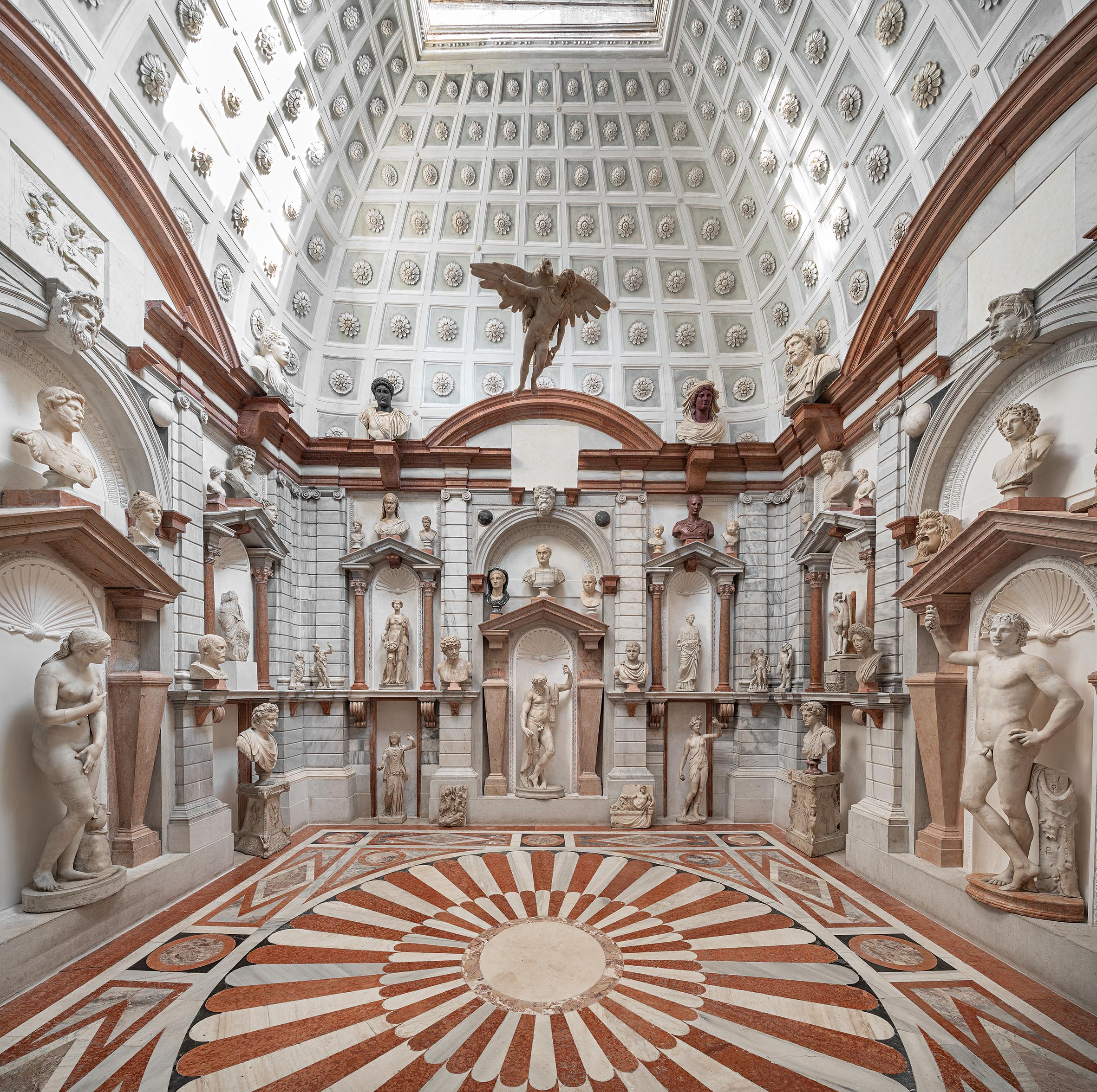 La Tribuna di Palazzo Grimani con le sculture